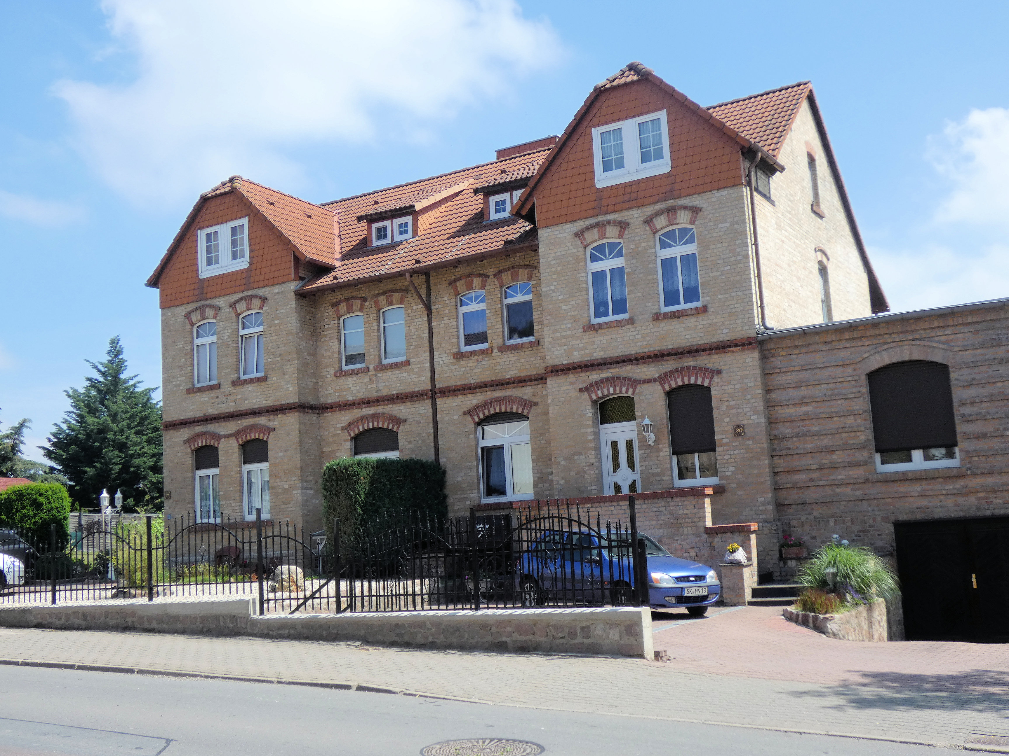 Teutschenthal-Bahnhof, Straße der Einheit 20, 22